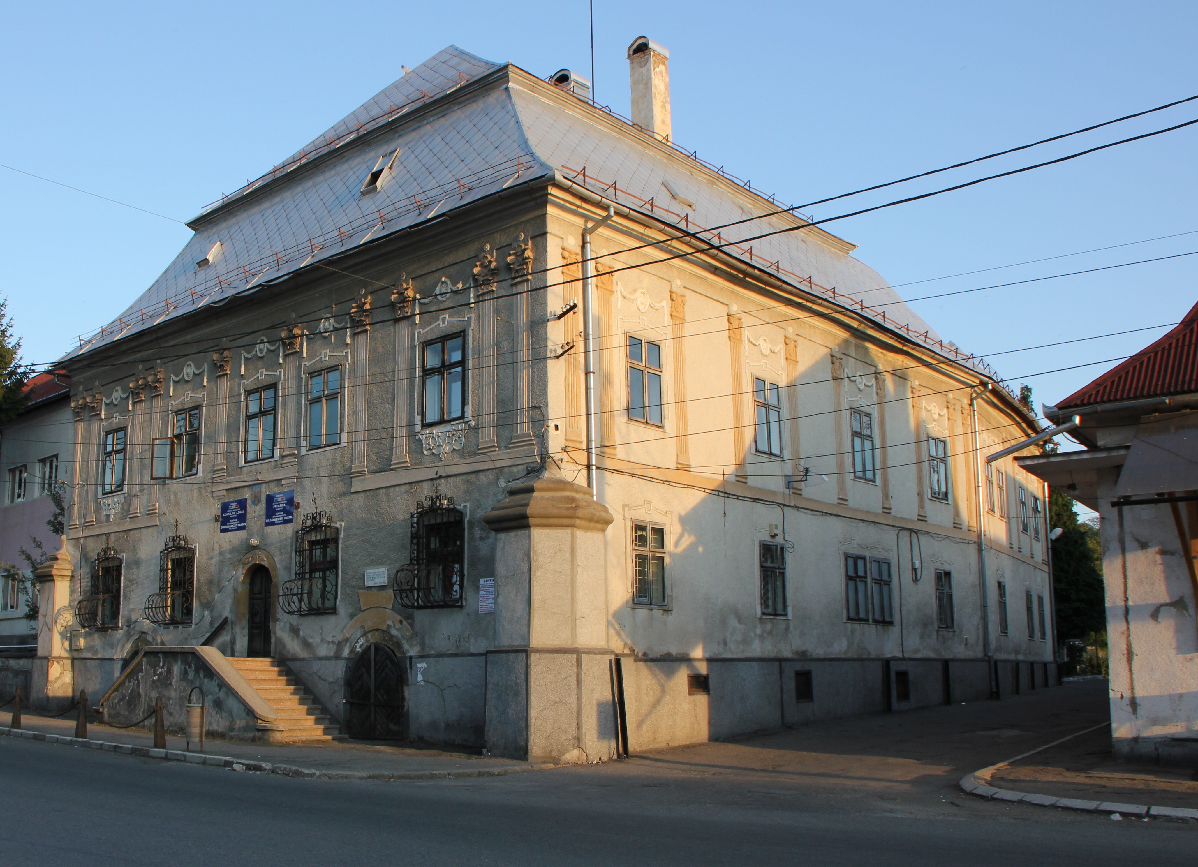 Sediul Oficiului minelor, azi Primăria, oraș Baia Sprie, Piața Libertății 4, 1733